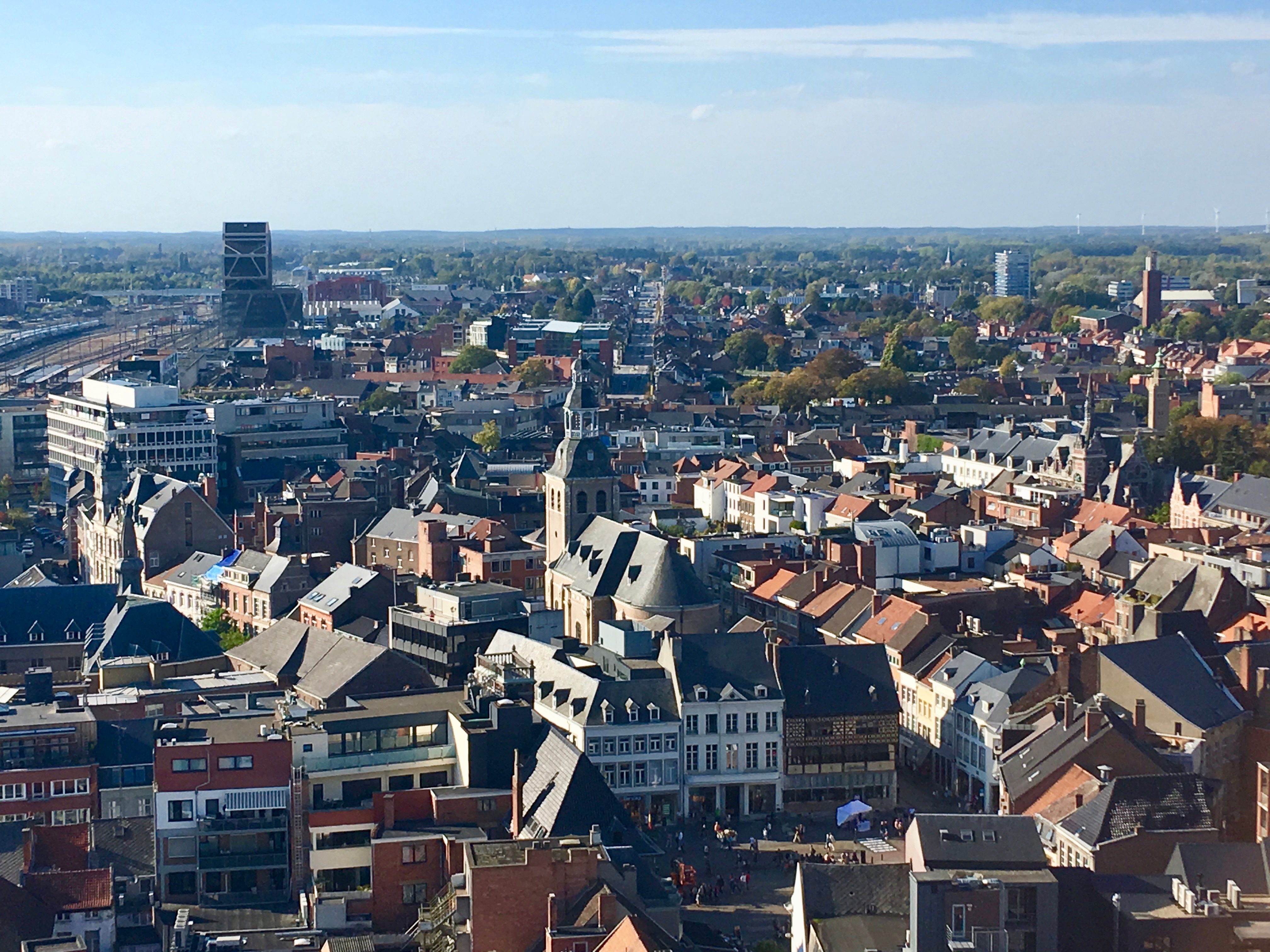 Stadszicht op centrum Hasselt met Virga-Jessebasiliek, gerechtsgebouw en oude Posterijen